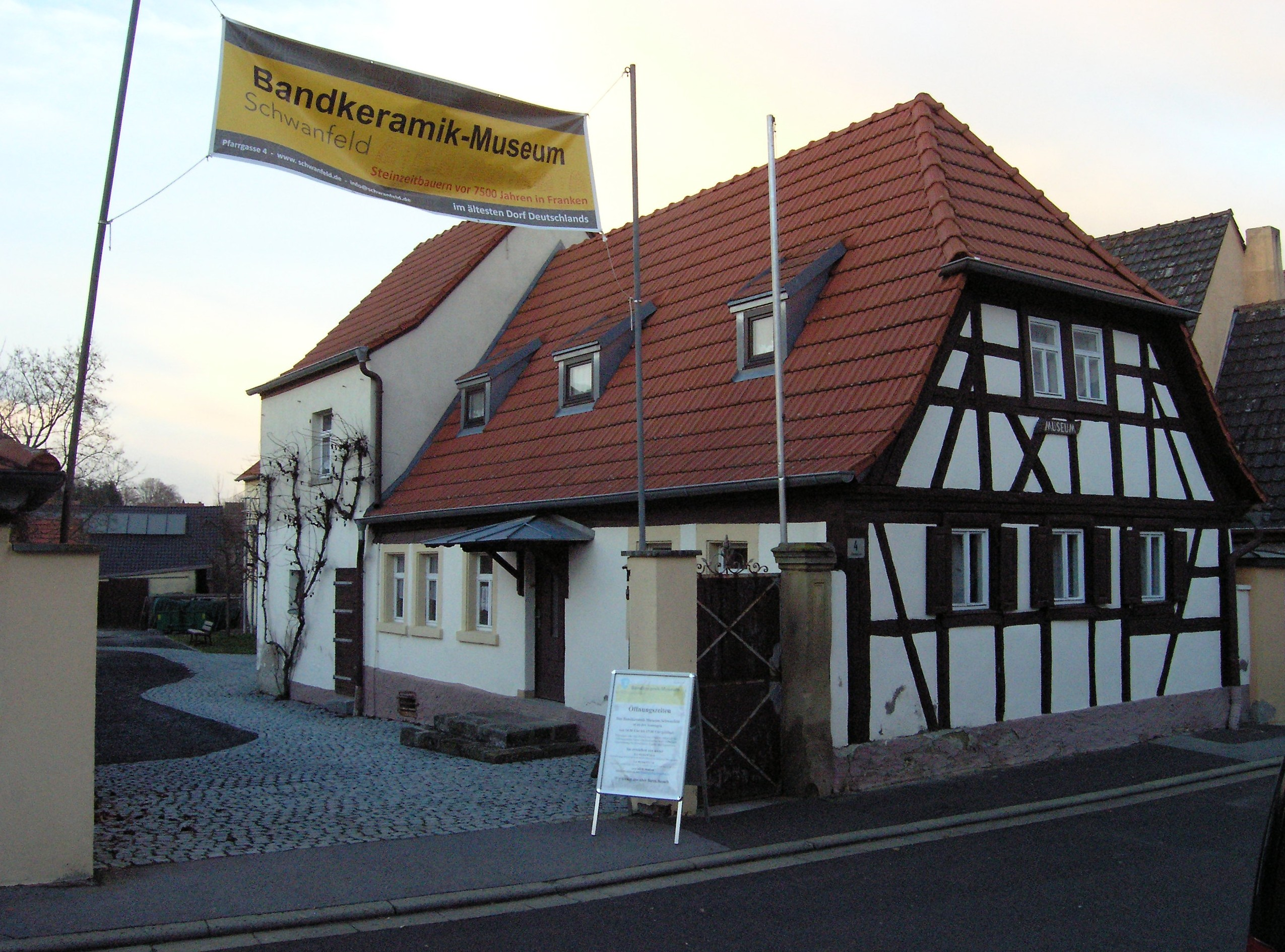 Bandkeramik-Museum Schwanfeld, Unterfranken